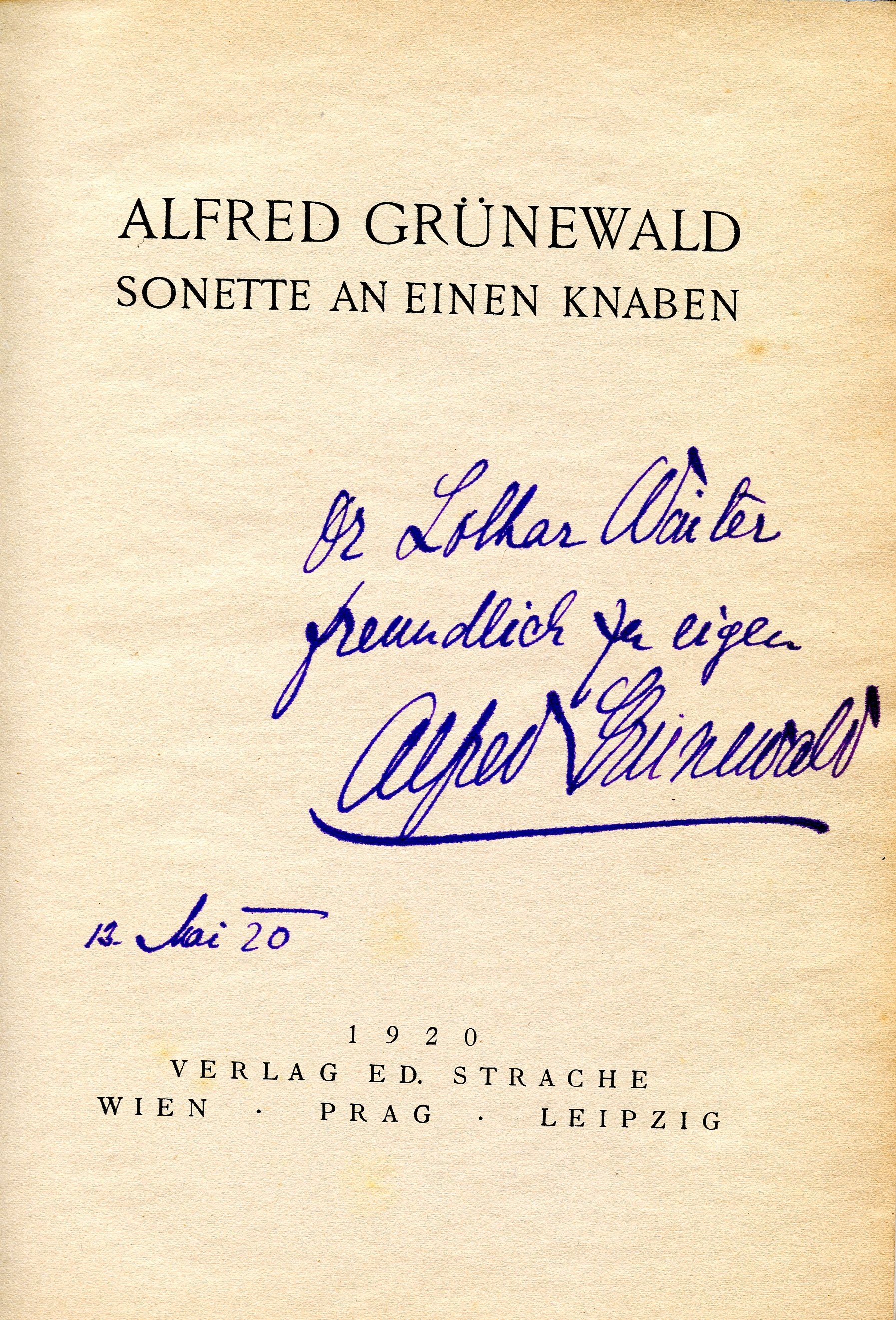 Alfred Grünewald: Sonette an einen Knaben, Verlag Eduard Strache, Wien - Prag - Leipzig, 1920